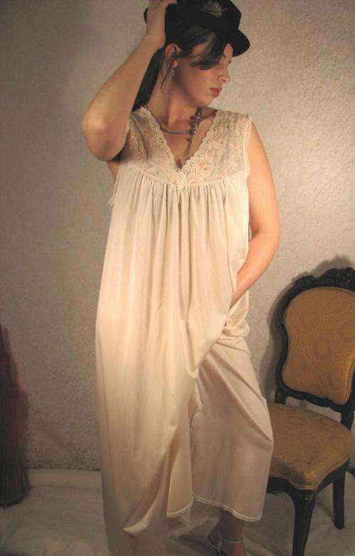 Own work